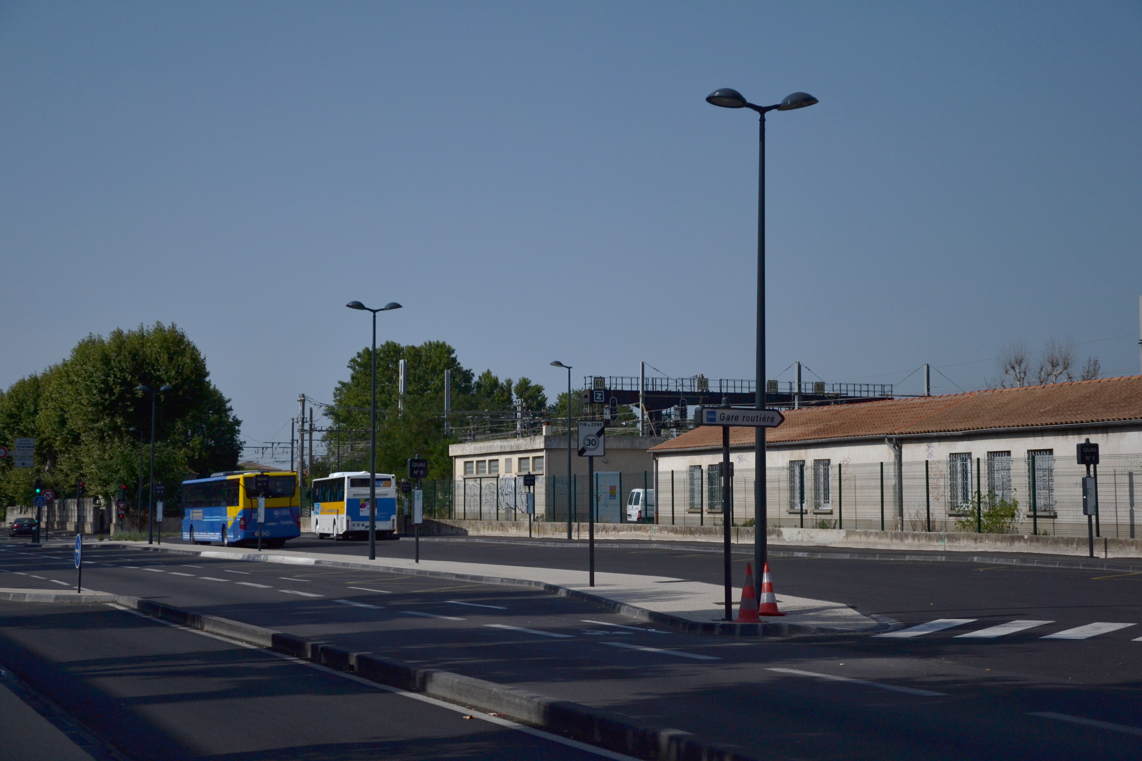 Gare Routière, près de la Gare de Cavaillon